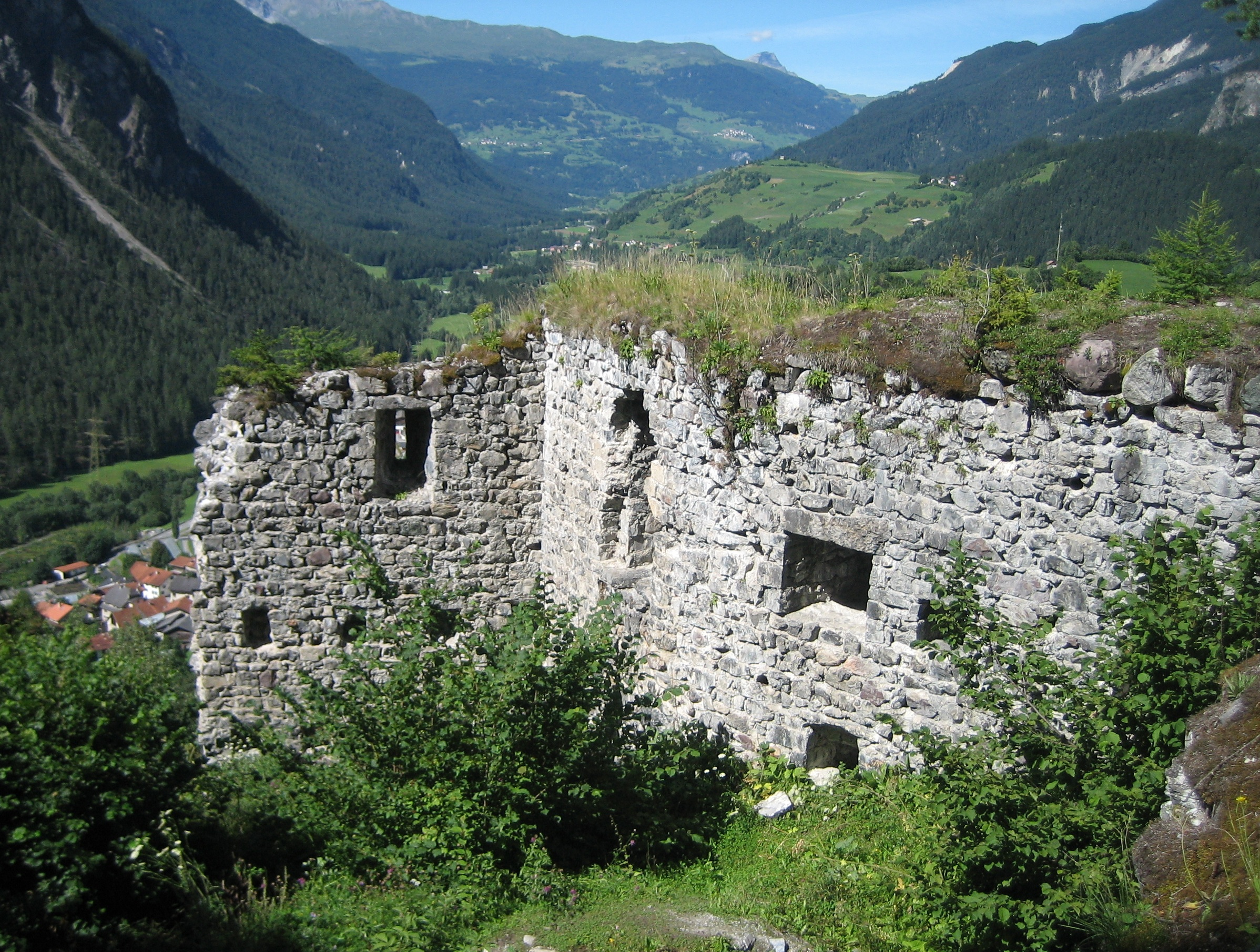 Blick in die Anlage nach NW